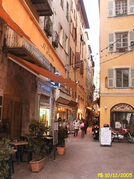 La rue du Pont-Vieux à son départ de la place Rossetti en direction N.